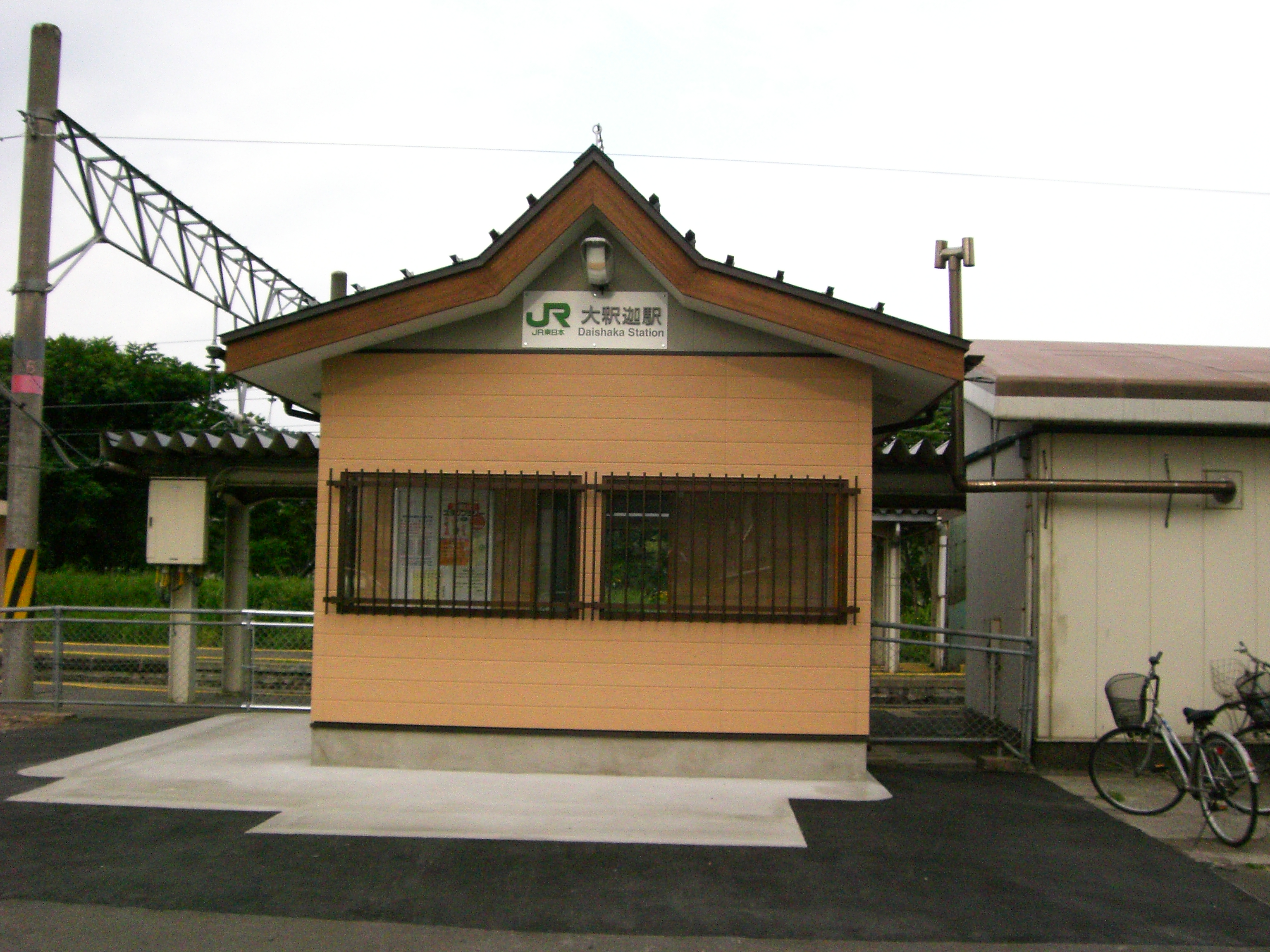 新大釈迦駅舎